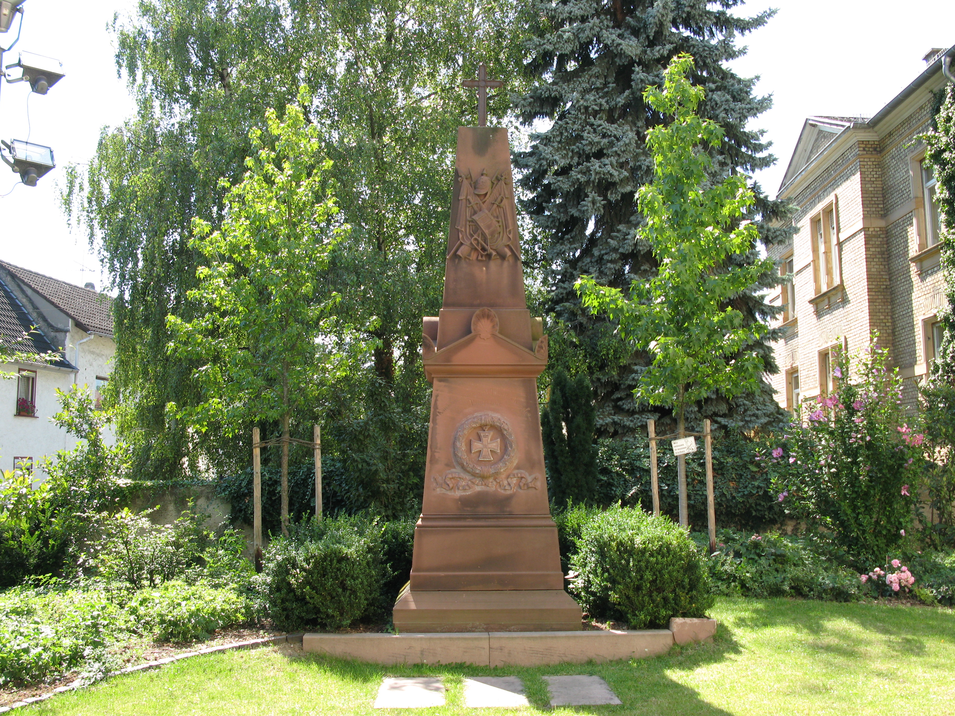 Ebersheimer Kriegsdenkmal